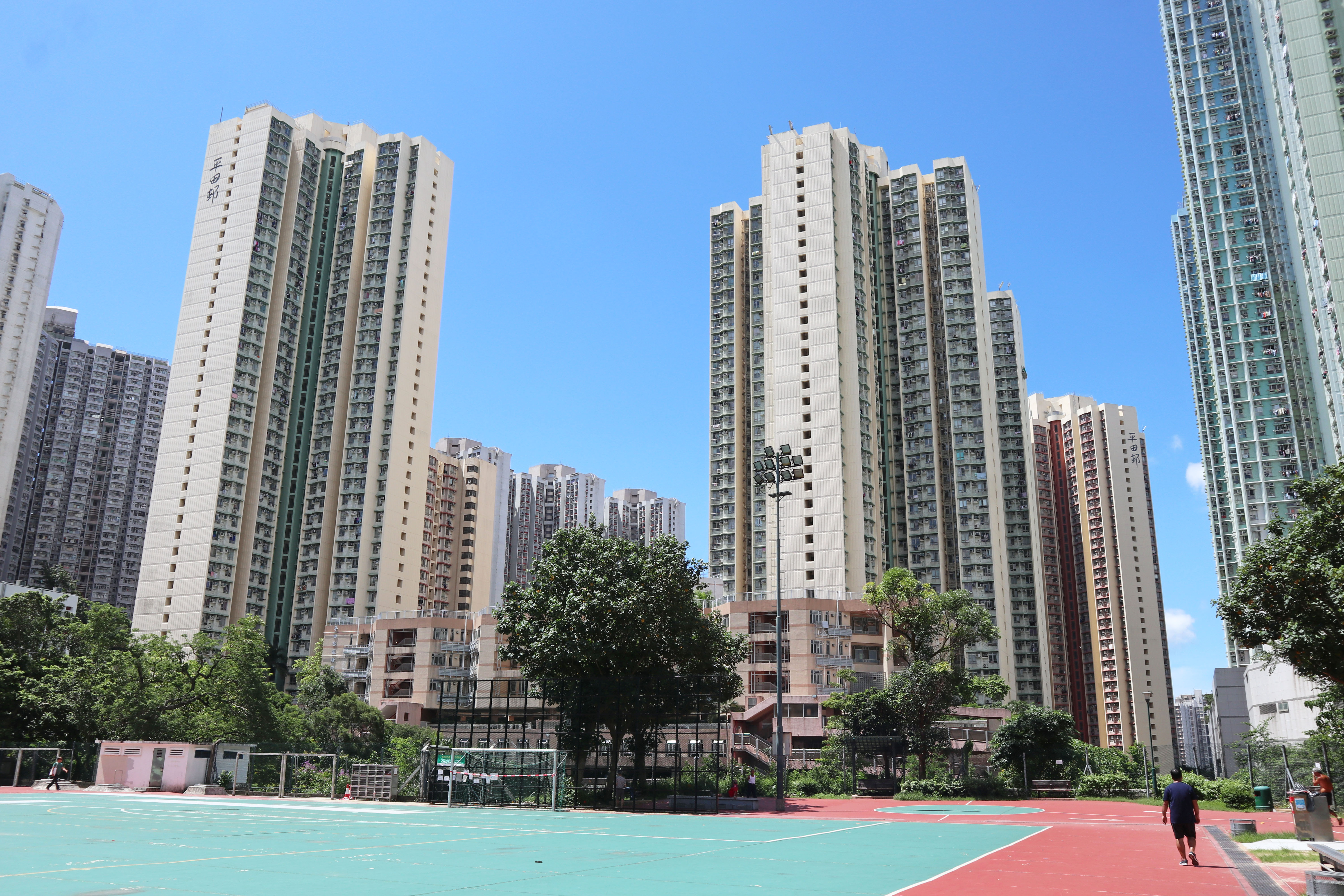 藍田平田邨外觀